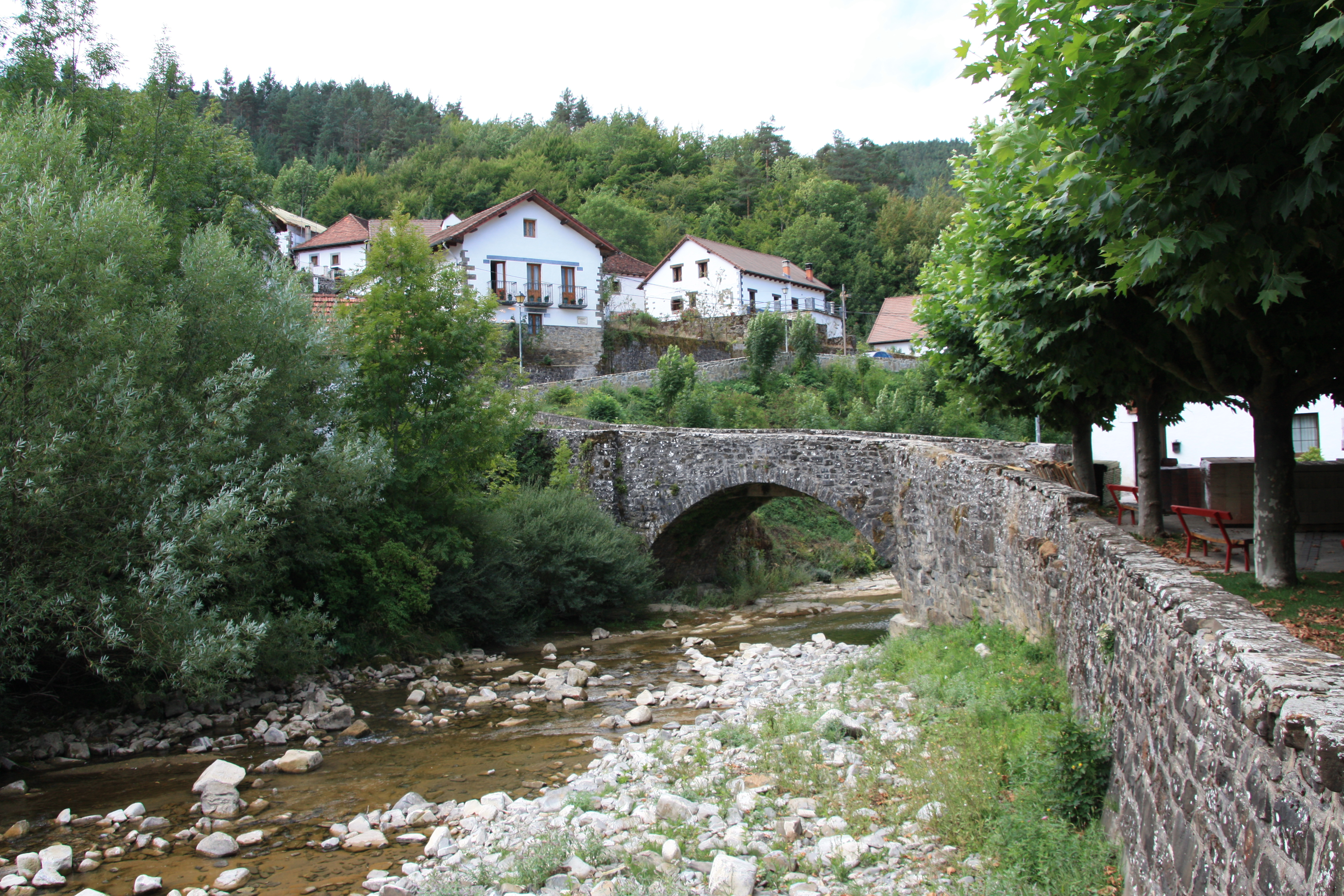 Itzaltzuko zubiaren ikuspegia.